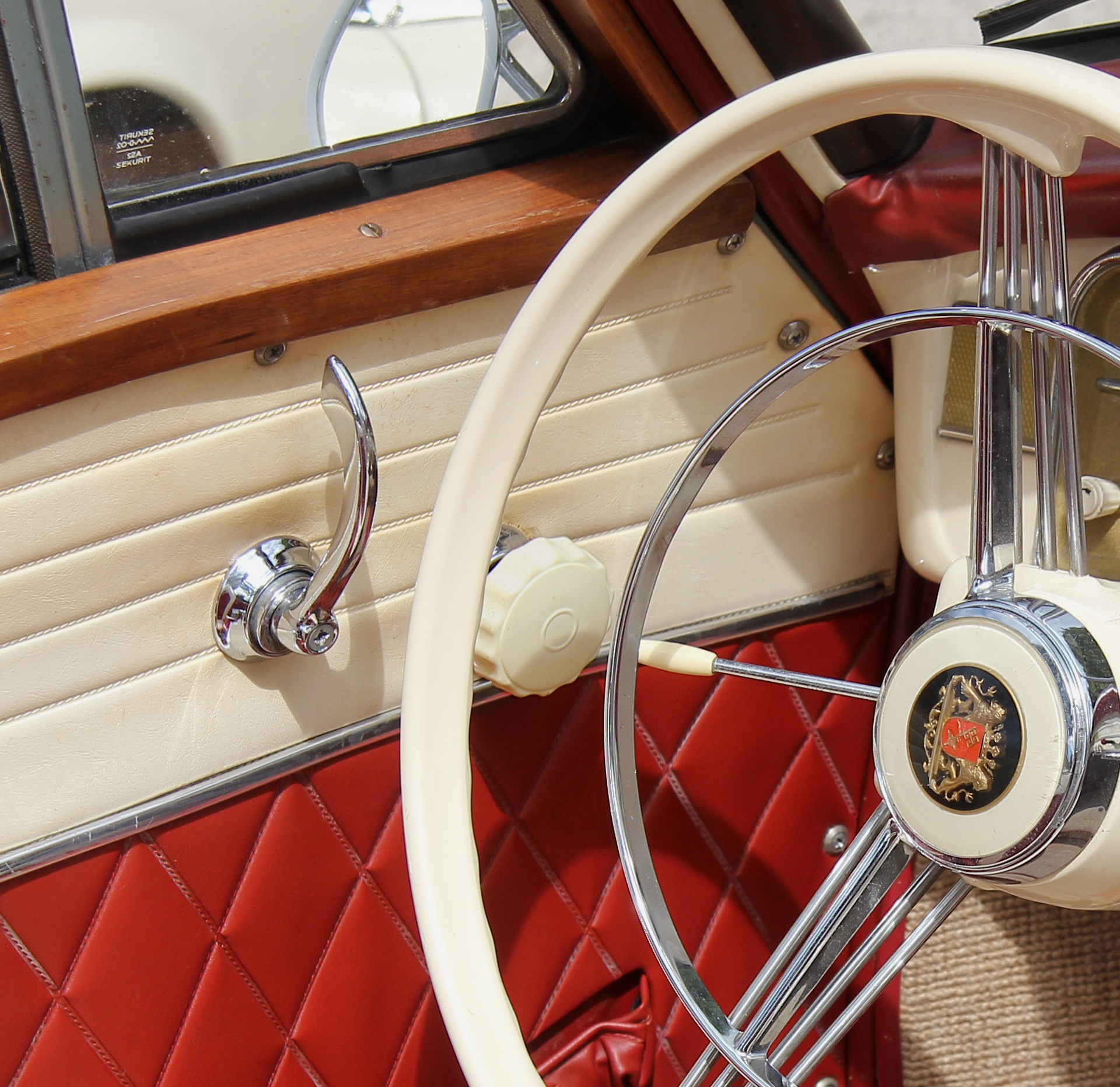 Borgward Isabella, Handrad zum Verstellen des Ausstellfensters